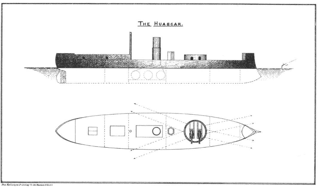 Planta y perfil del monitor Huascar